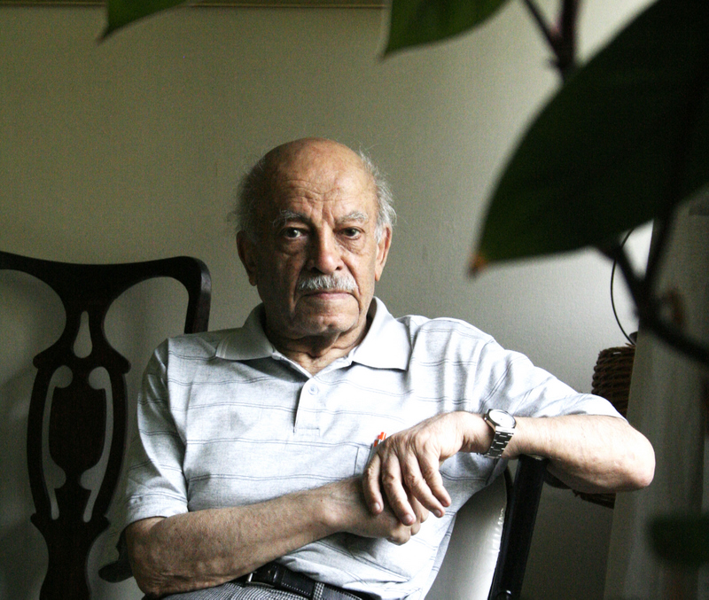 نویسنده، مدرس موسیقی